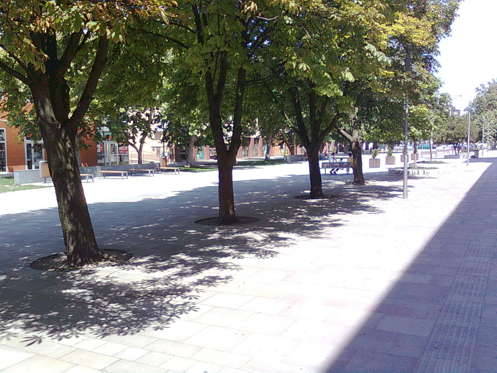 Šaľa - pešia zóna